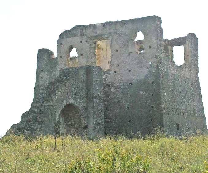 == Licenza d'uso: ==